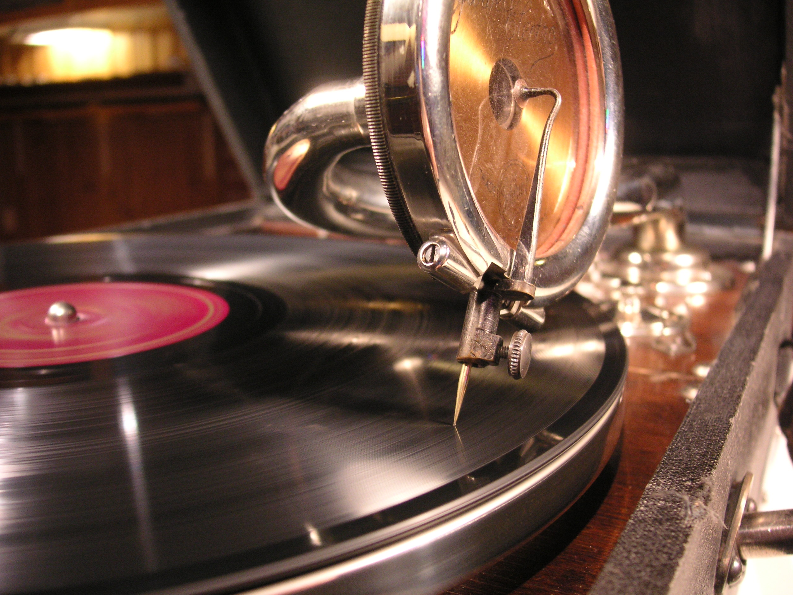 "Juvel" resegrammofon, pickupp